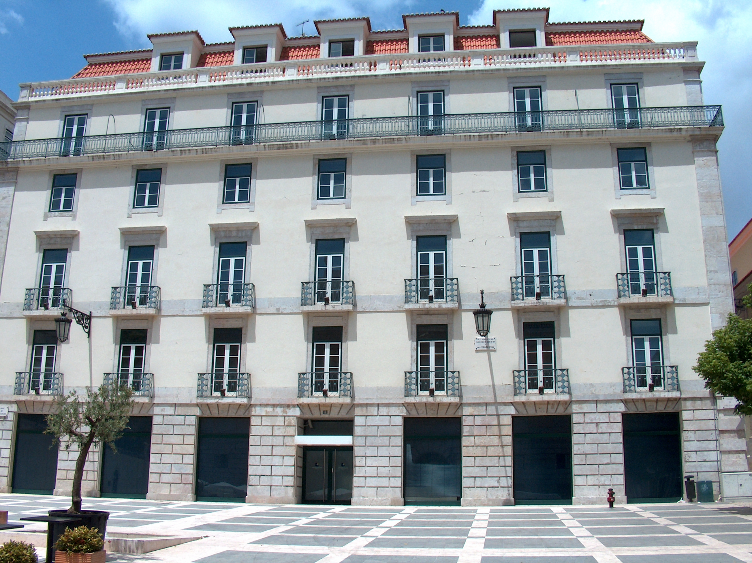 Casa onde nasceu Fernando Pessoa, no Largo de São Carlos em Lisboa